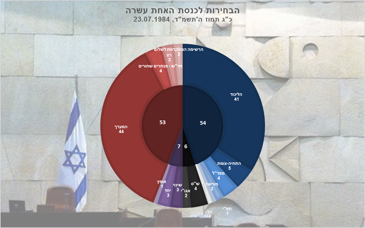 תוצאות הבחירות לכנסת האחת עשרה